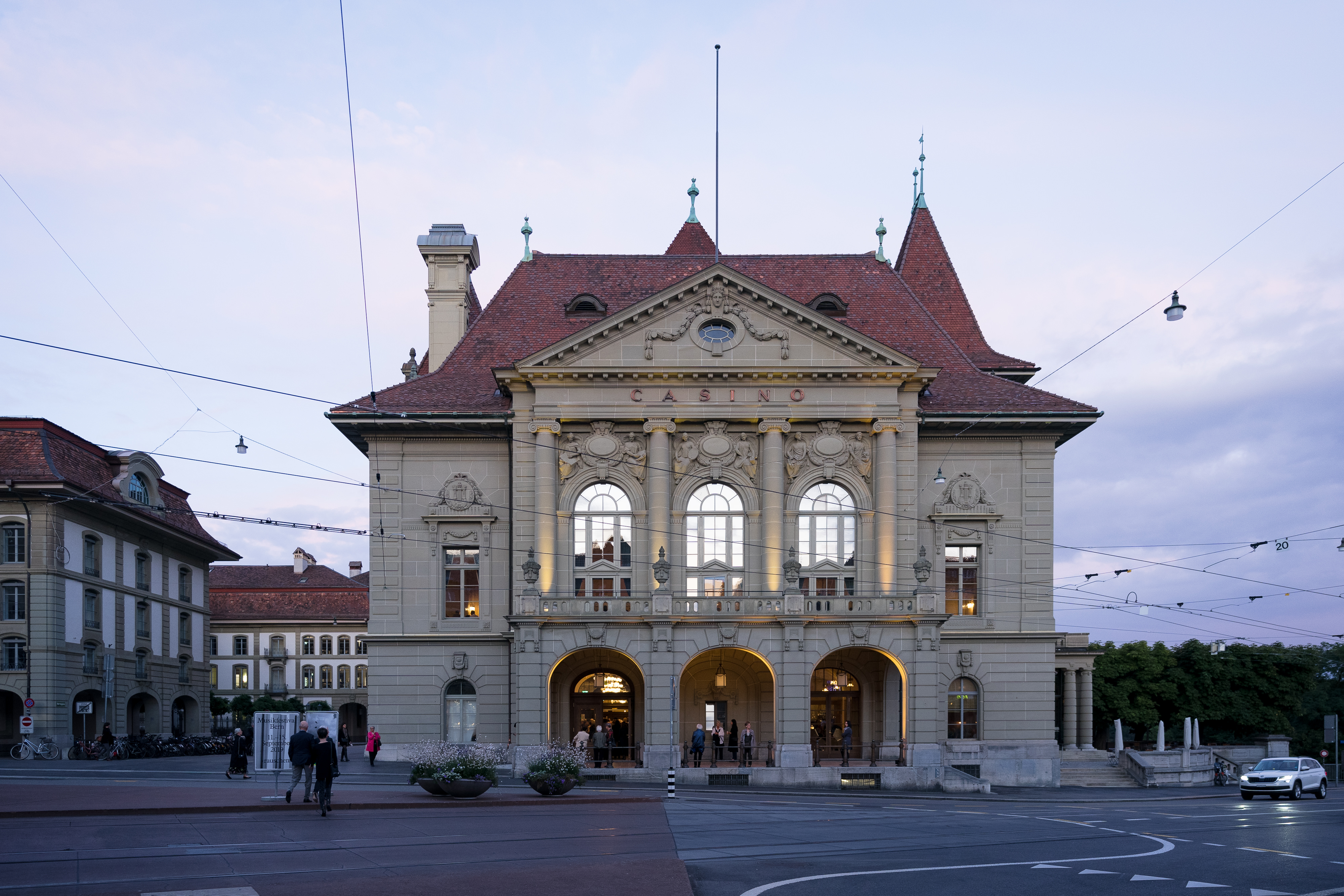 Das Casino Bern, fotografiert bei der Wiedereröffnung am 05.09.2019.